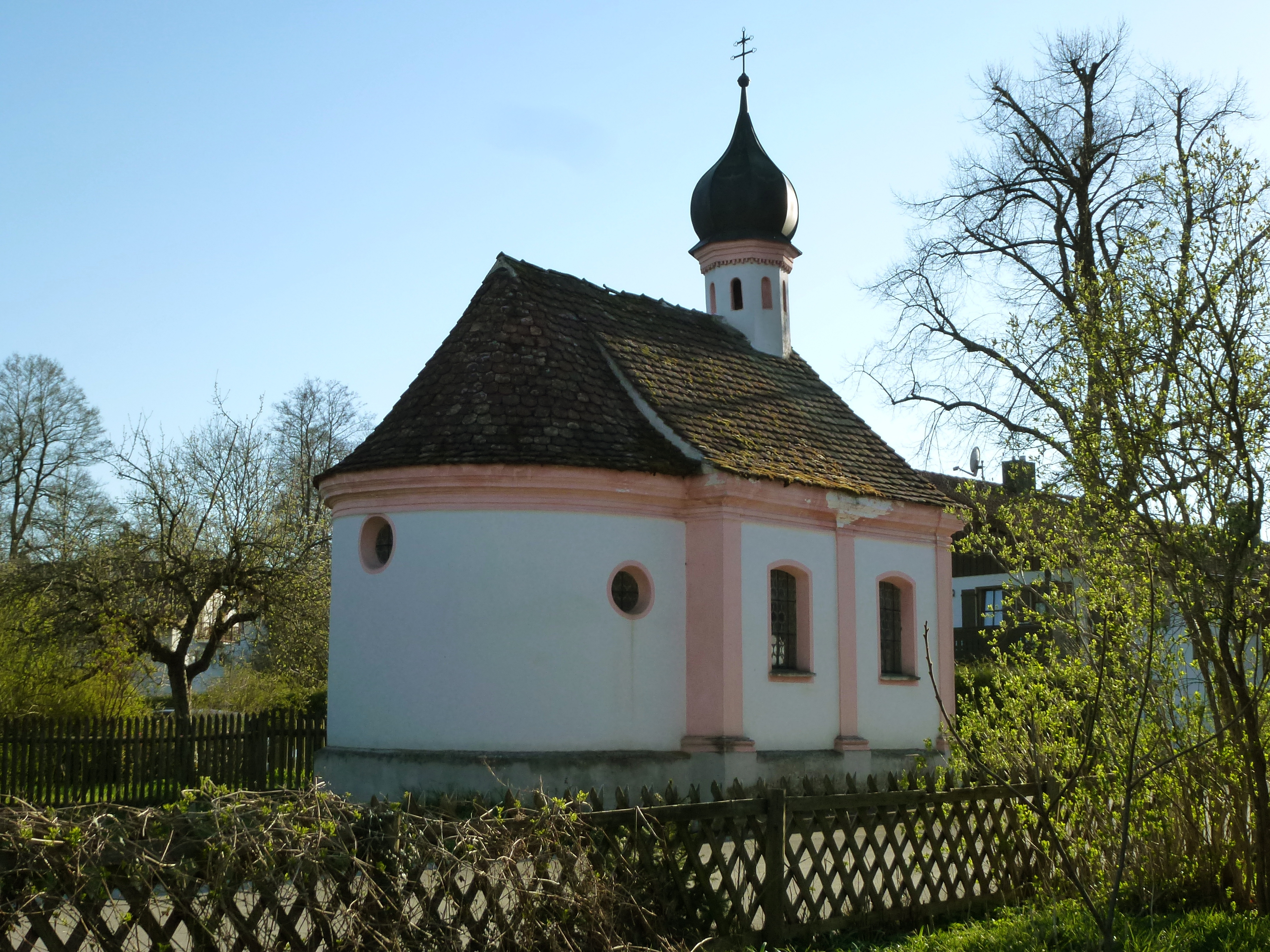 Dießen-Riederau, Rogister Str. 4, Katholische Kapelle Maria Hilf aus dem Jahr 1796. Aufnahme aus NO